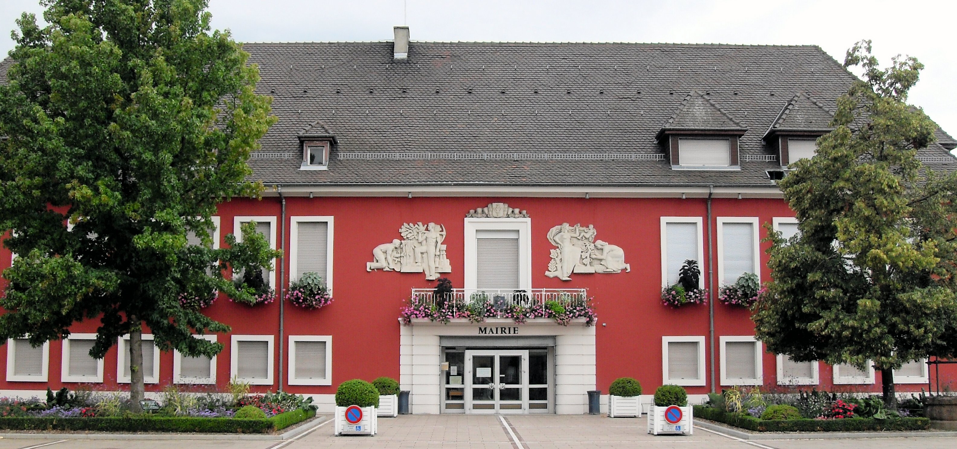 La mairie de Wittelsheim